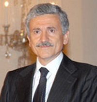 Il ministro degli Affari Esteri Massimo D'Alema.